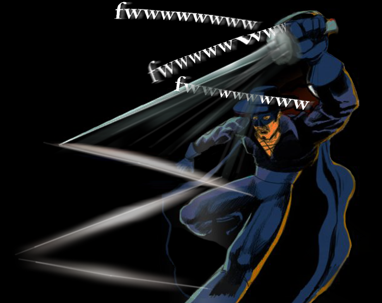 Le bruit de l'épée de Zorro (son Nombre de Strouhal). Image tirée du fichier avec les apports de Starcheuch